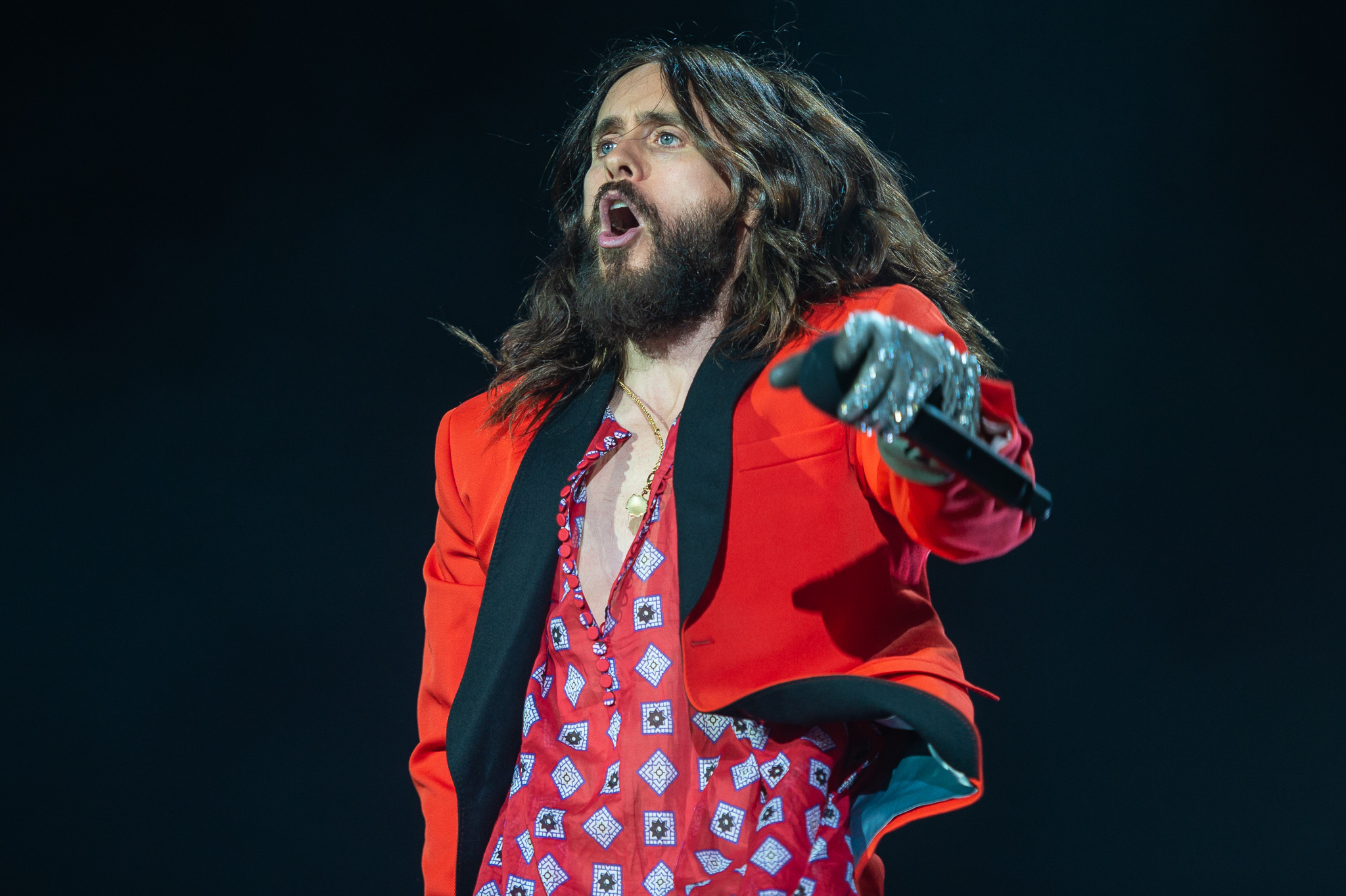 ARGO-Konzerte,Festival,Jared Leto,Konzert,Livekonzert,Livemusik,Musik,RiP,Rock im Park 2018,Thirty Seconds to Mars,Zeppelin Stage